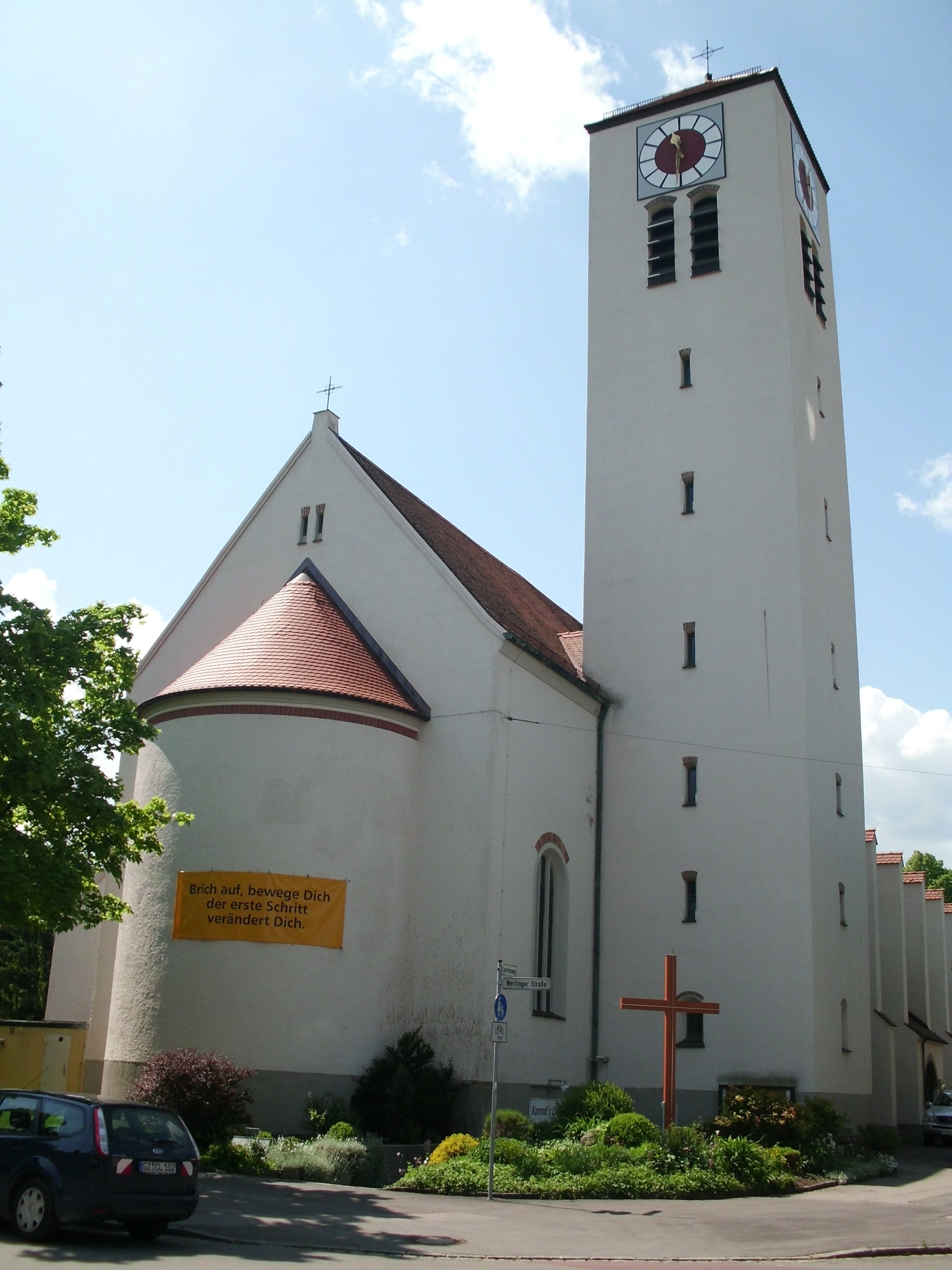 Kath. Bruder-Konrad-Kirche Augsburg